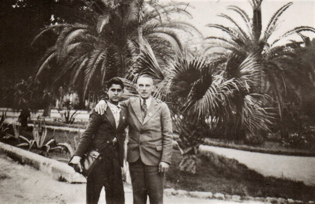 Italienaufenthalt von Walter Kuno Kriesel (rechts) in Palermo (Sizilien, 1937)